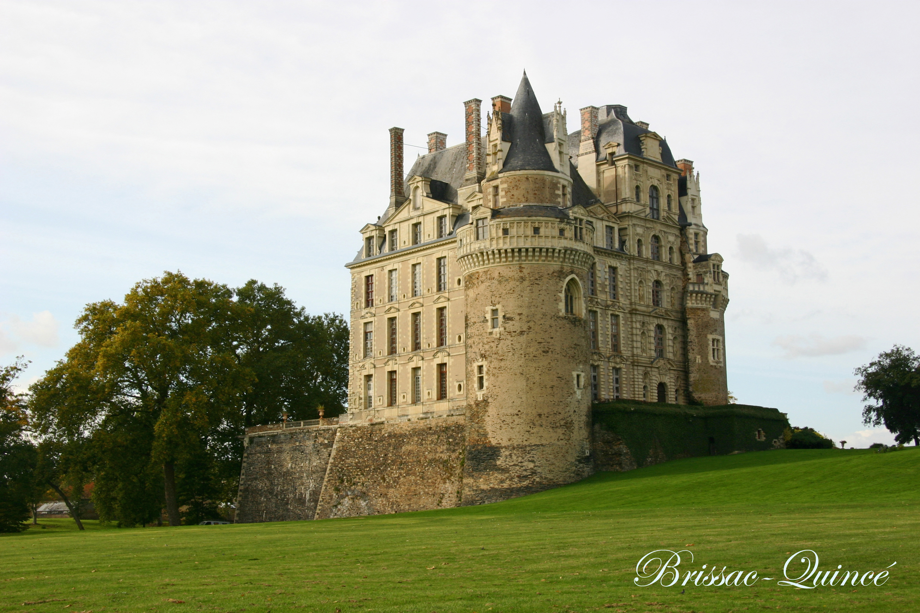 Schloss Brissac